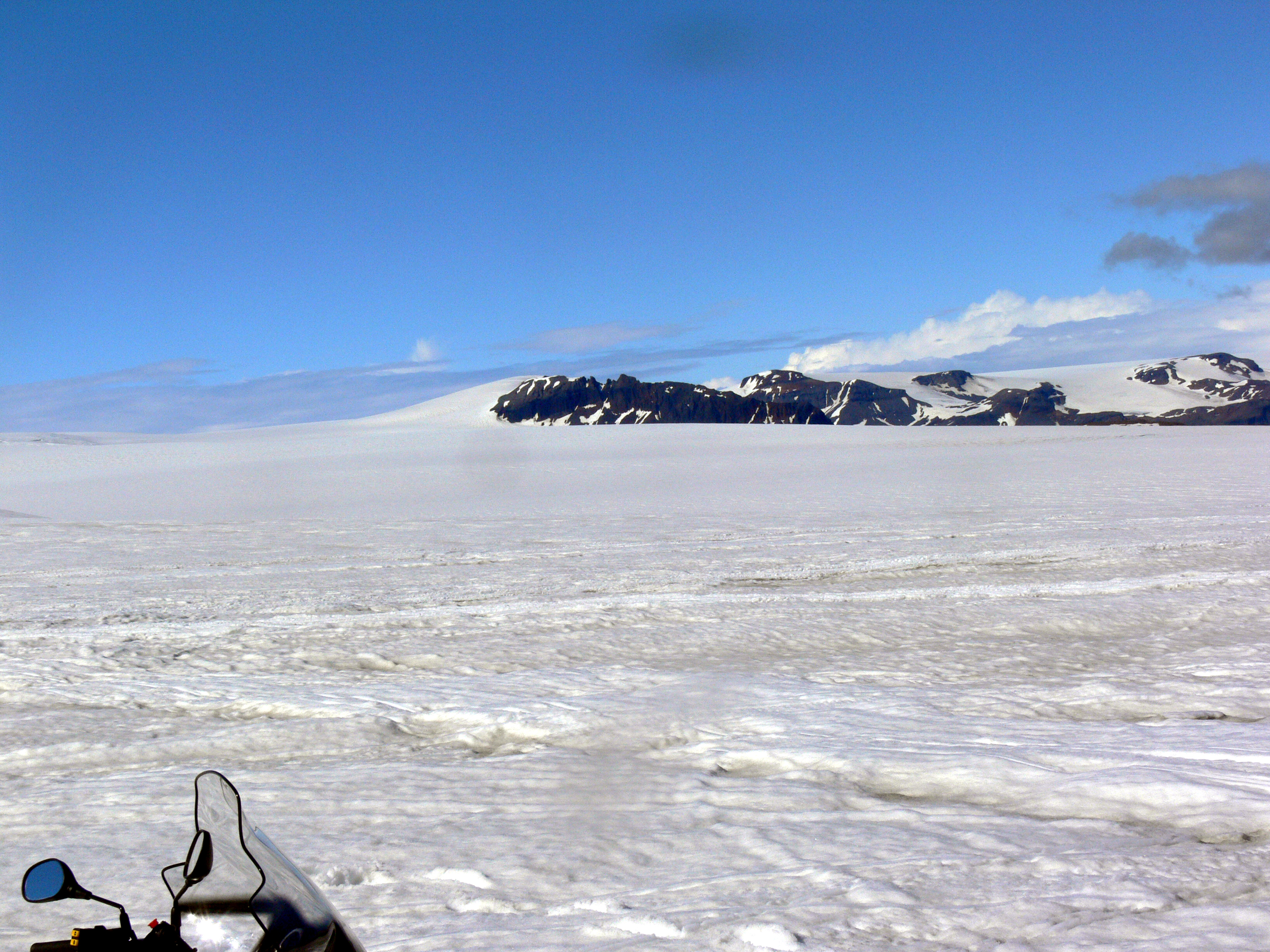 Skálafellsjökull, Gletscherzunge des Vatnajökull.